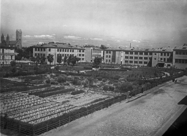 БДУ. Сквер і садовы гадавальнік ва Універсітэцкім гарадку, 1930-я